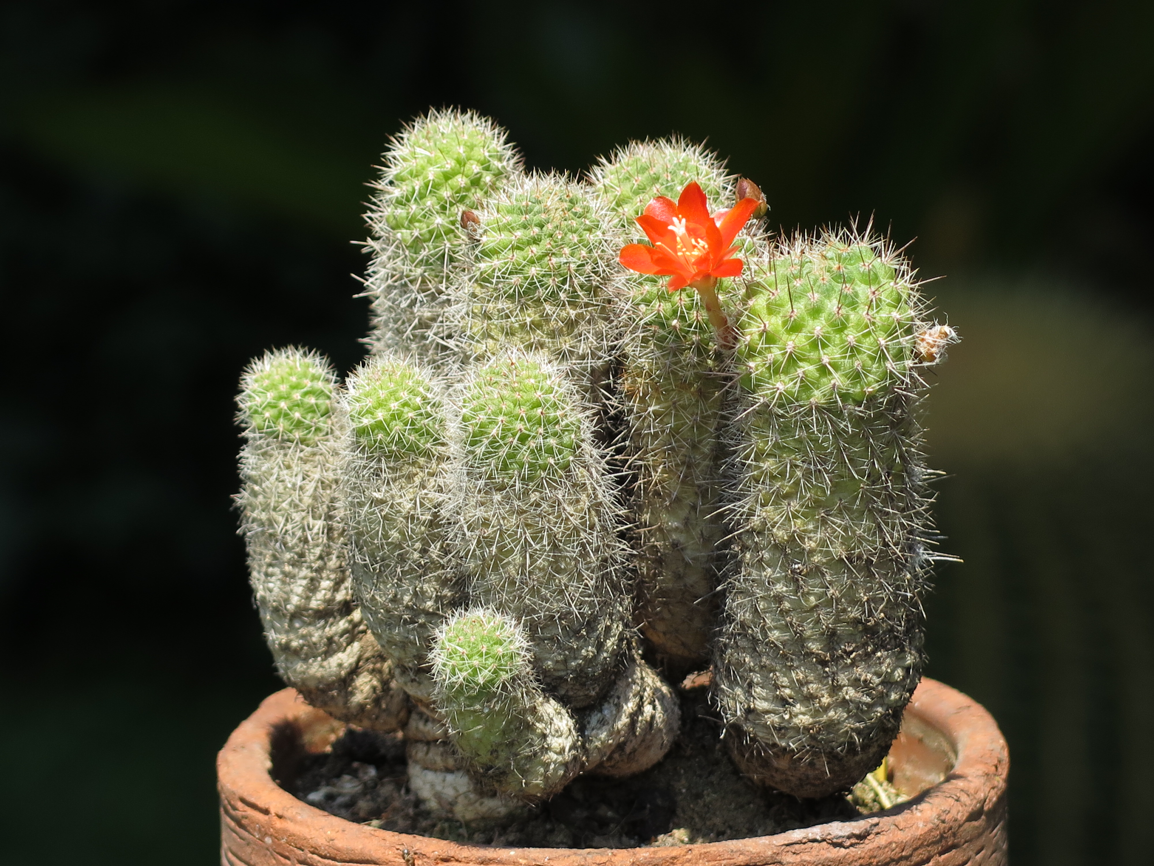 Una pianta di rebutia heliosa var. cajasensis in fiore